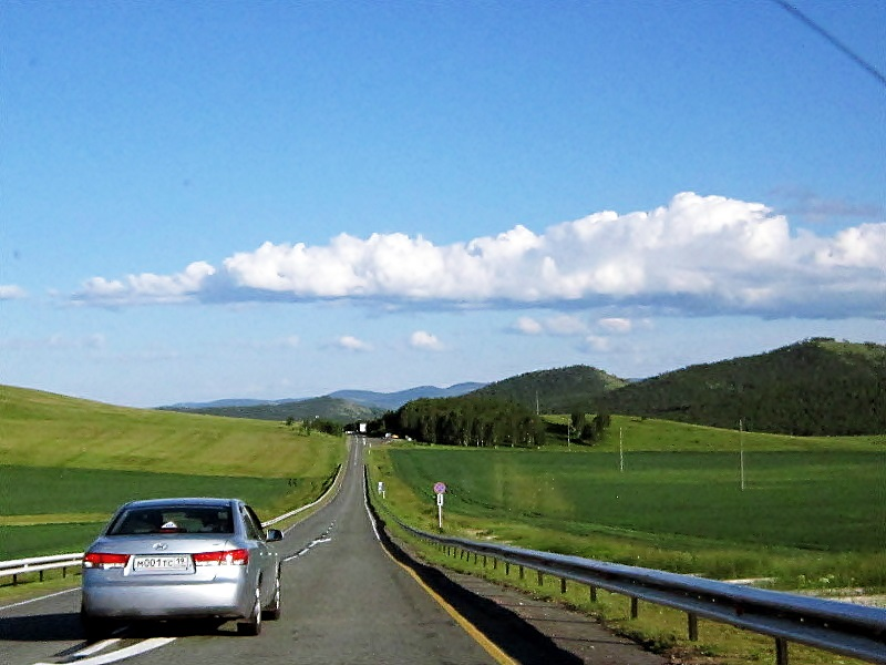 Автодорога Шира - Абакан. Ширинский район Хакасии. Справа - Батенёвский кряж.